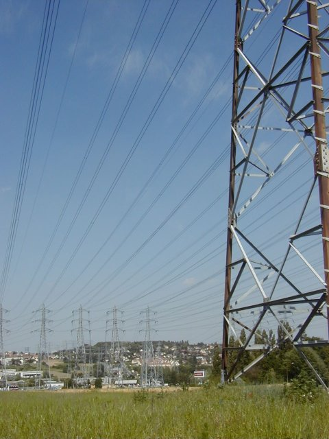 Lignes à haute tension prise de vue à proximité de Villebon-sur-Yvette dans l'Essonne.